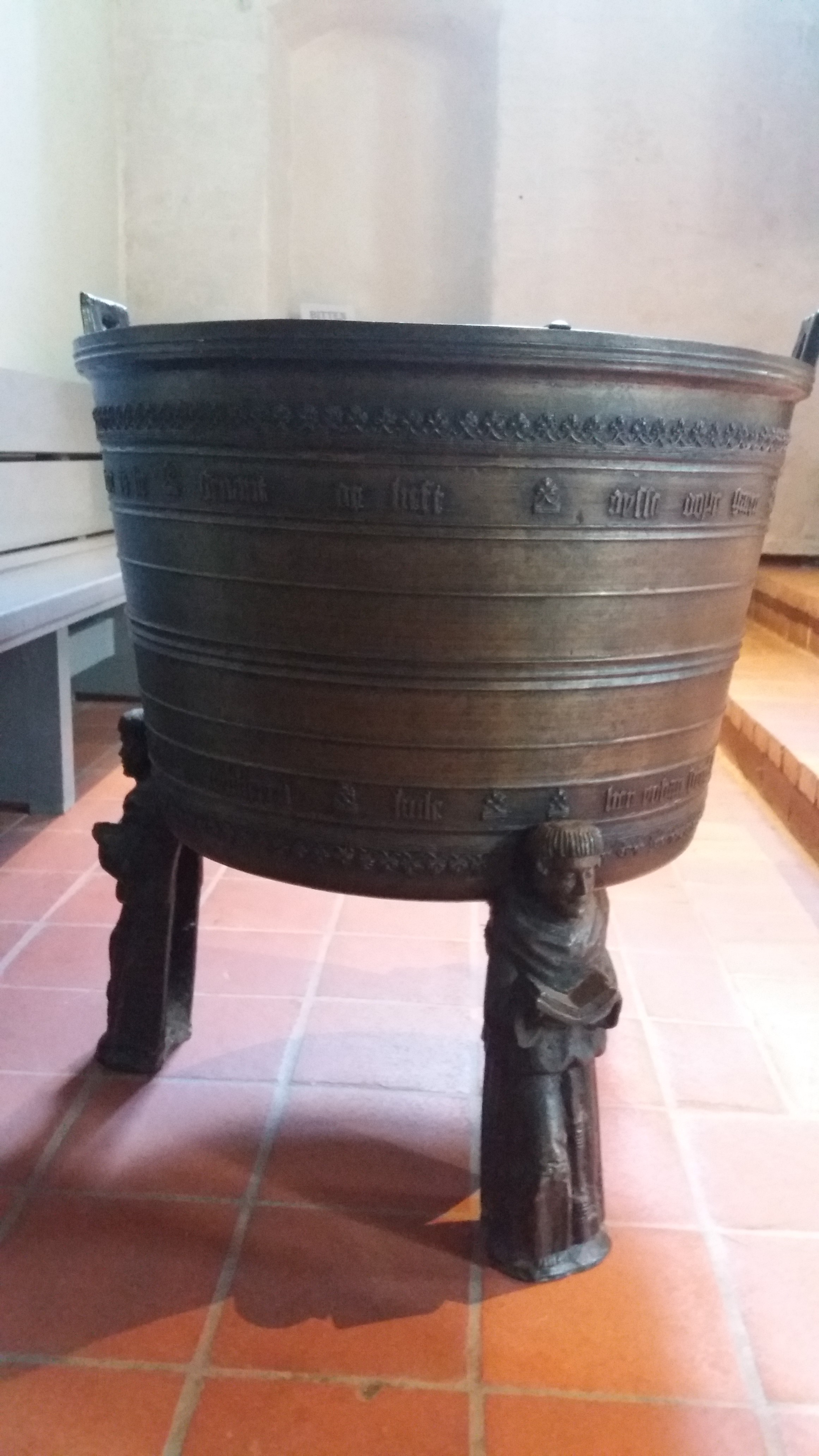 Taufbecken mit lesenden Mönchsfiguren